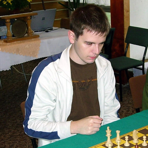 Radosław Jedynak, Bydgoszcz 2006